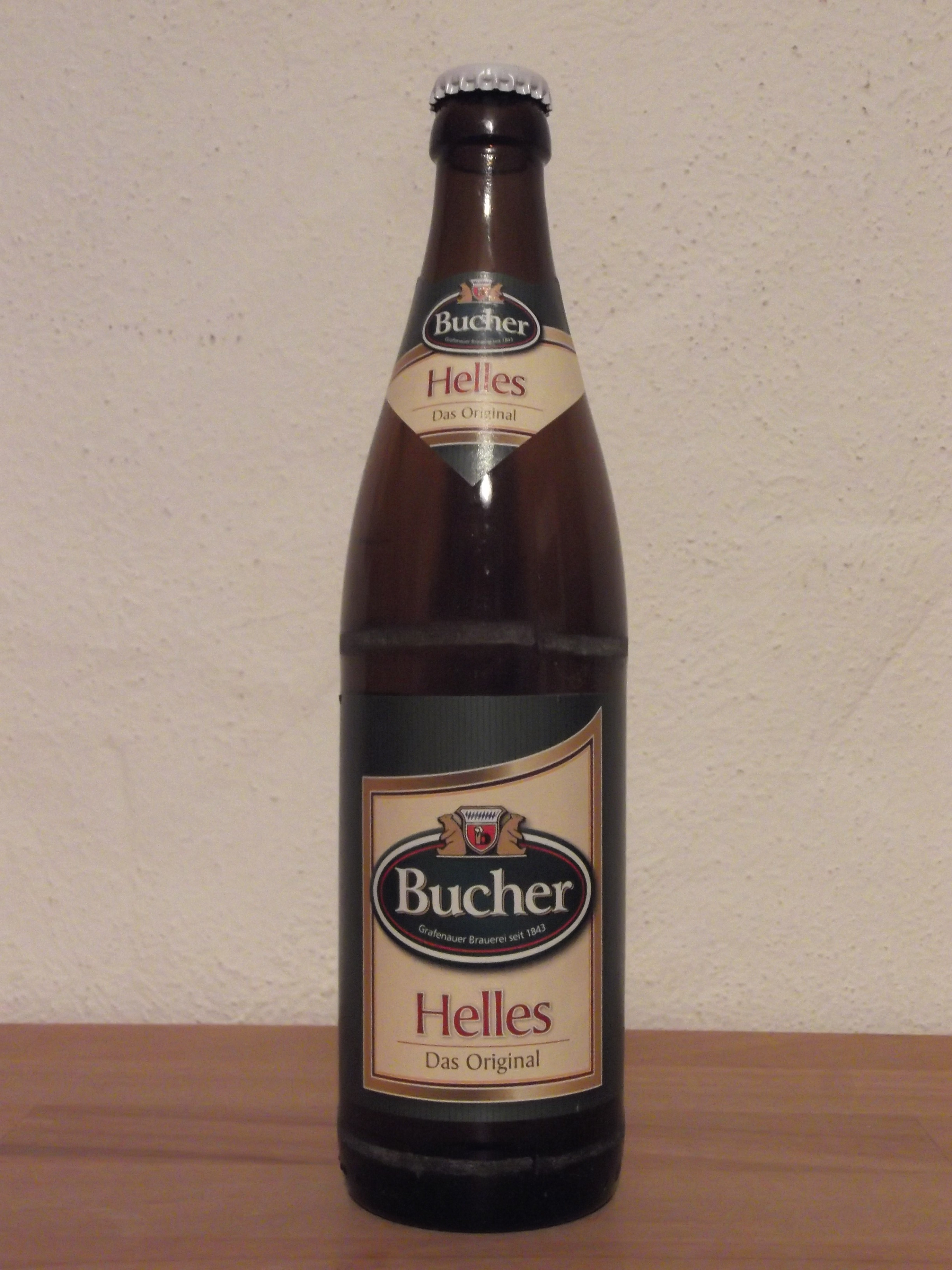 Flaschenabfüllung 0,5l